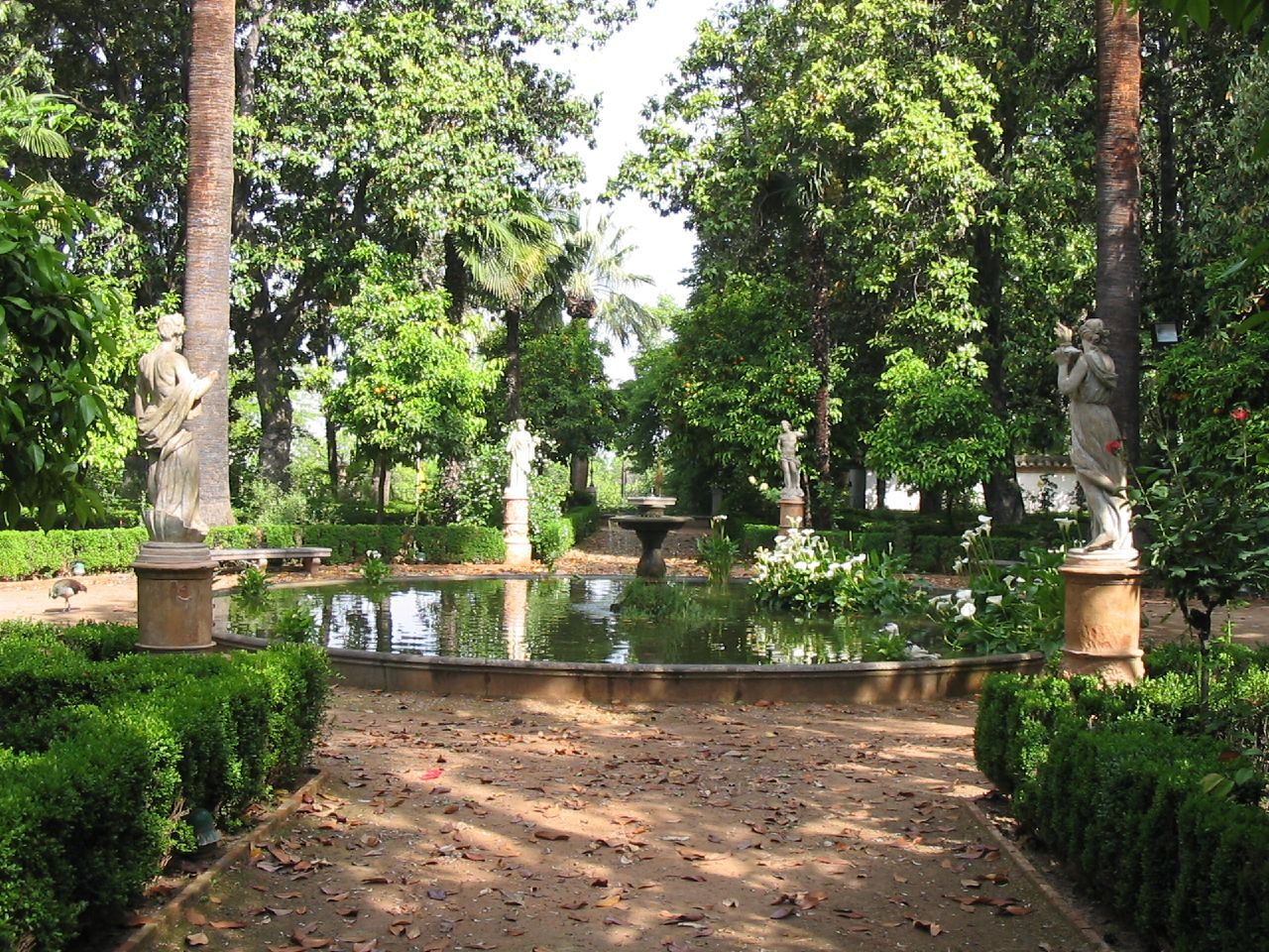 Uno de los jardines del Carmen de los Mártires de Granada.